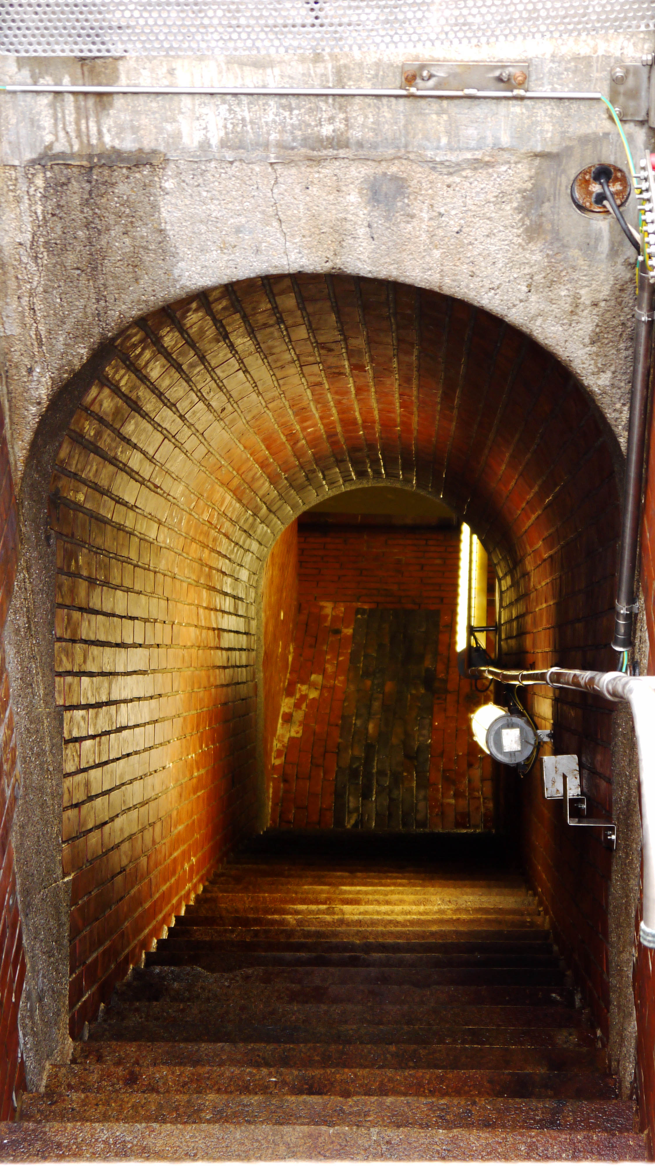 Zugang zur Kanalisation